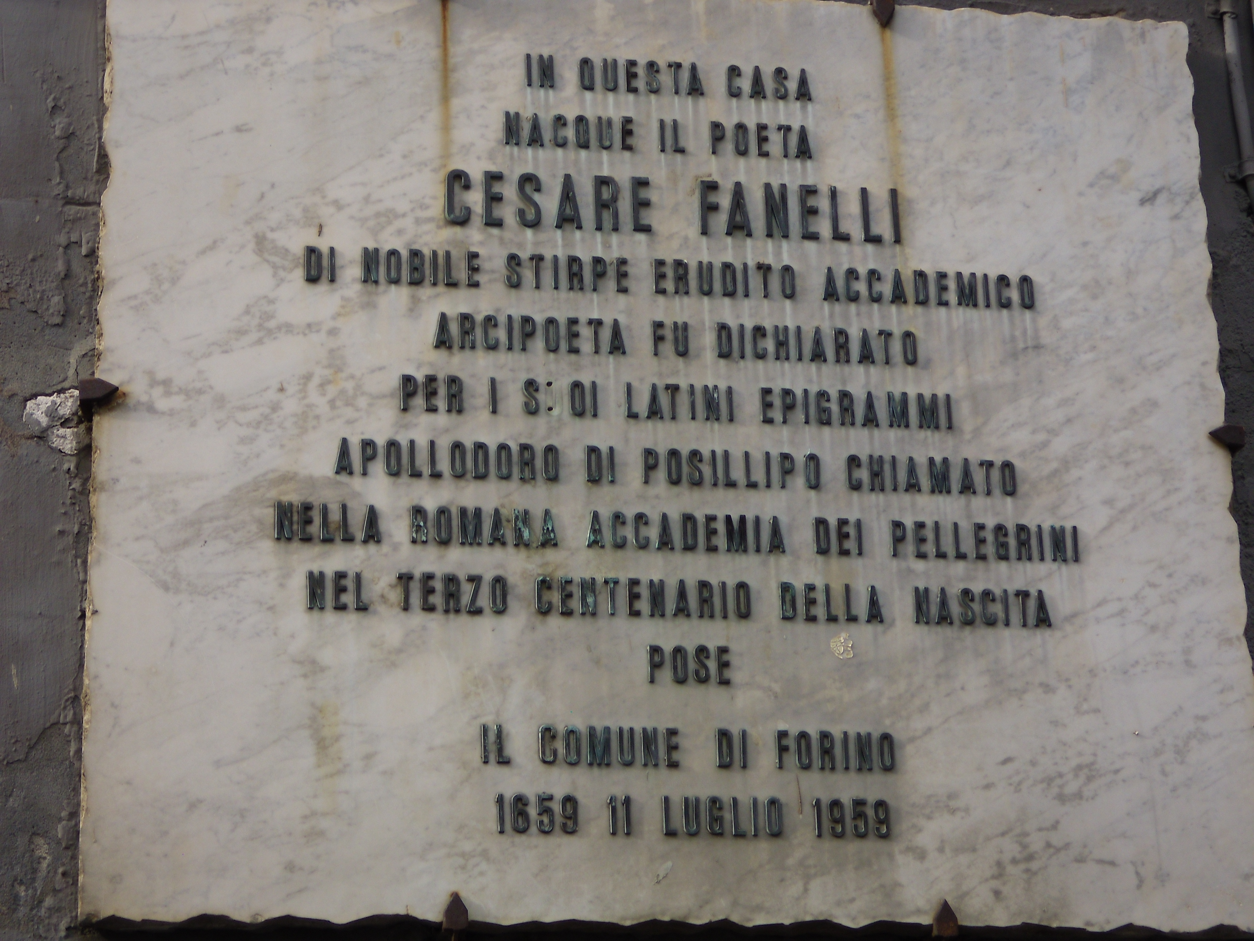 Iscrizione di pubblico dominio posta dal Comune di Forino in memoria dei 300 anni dalla nascita del poeta Cesare Antonio Fanelli